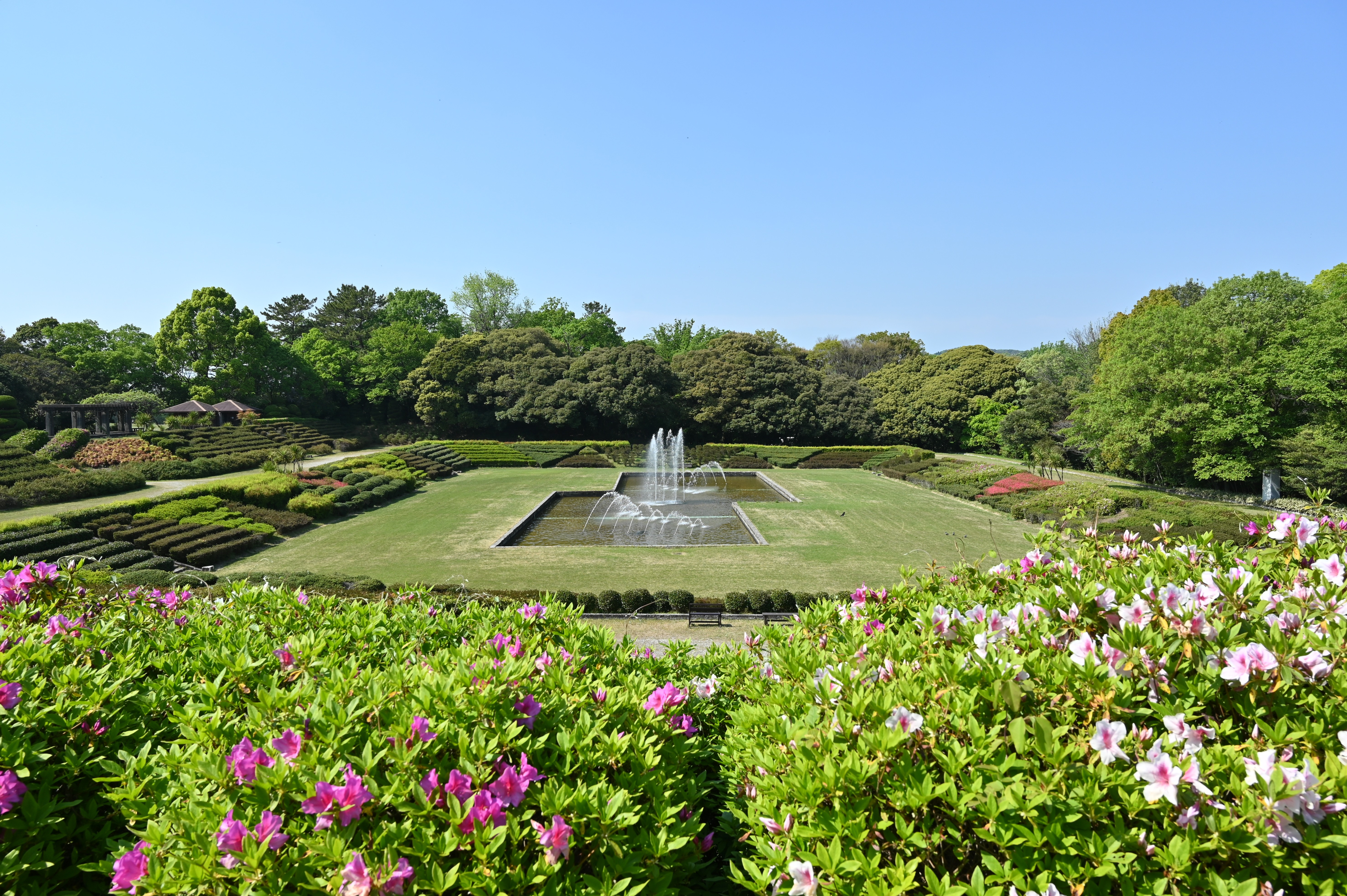 森林公園の沈床花壇